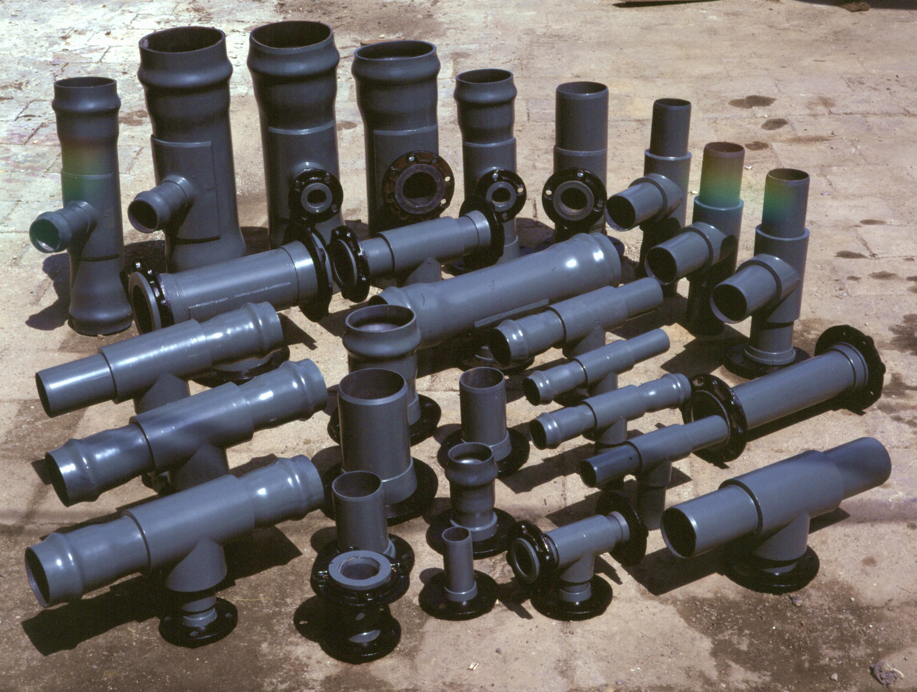 Ekspozycja kształtek hydraulicznych z PCV. Skan z diapozytywu barwnego.